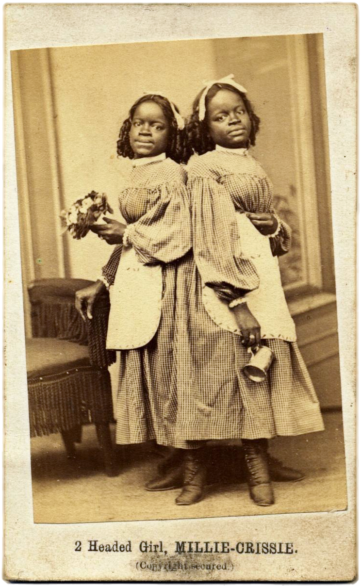 Millie and Christine McKoy